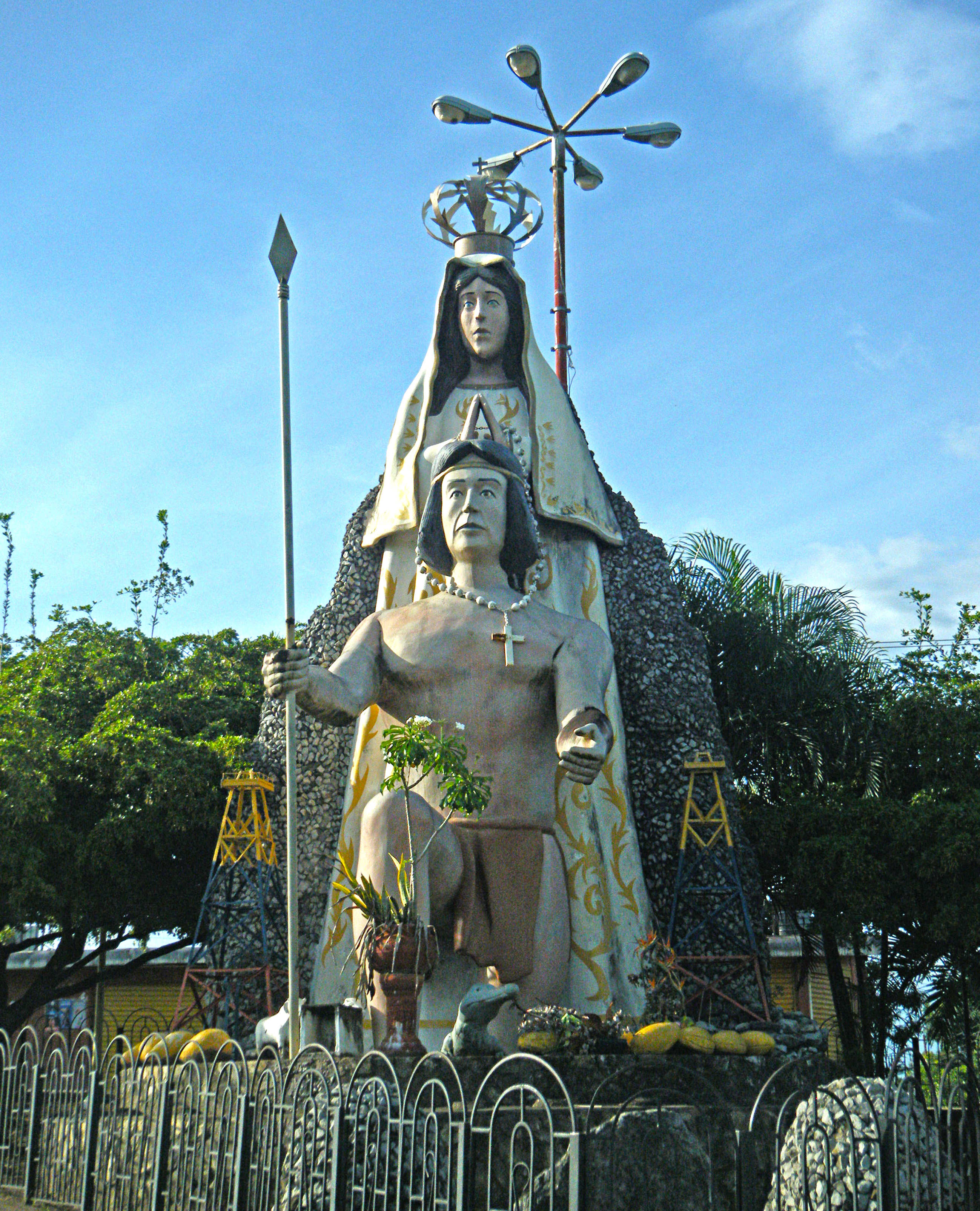 Monumento a la identidad con La virgen del valle y el indio punceres, Estado Monagas.